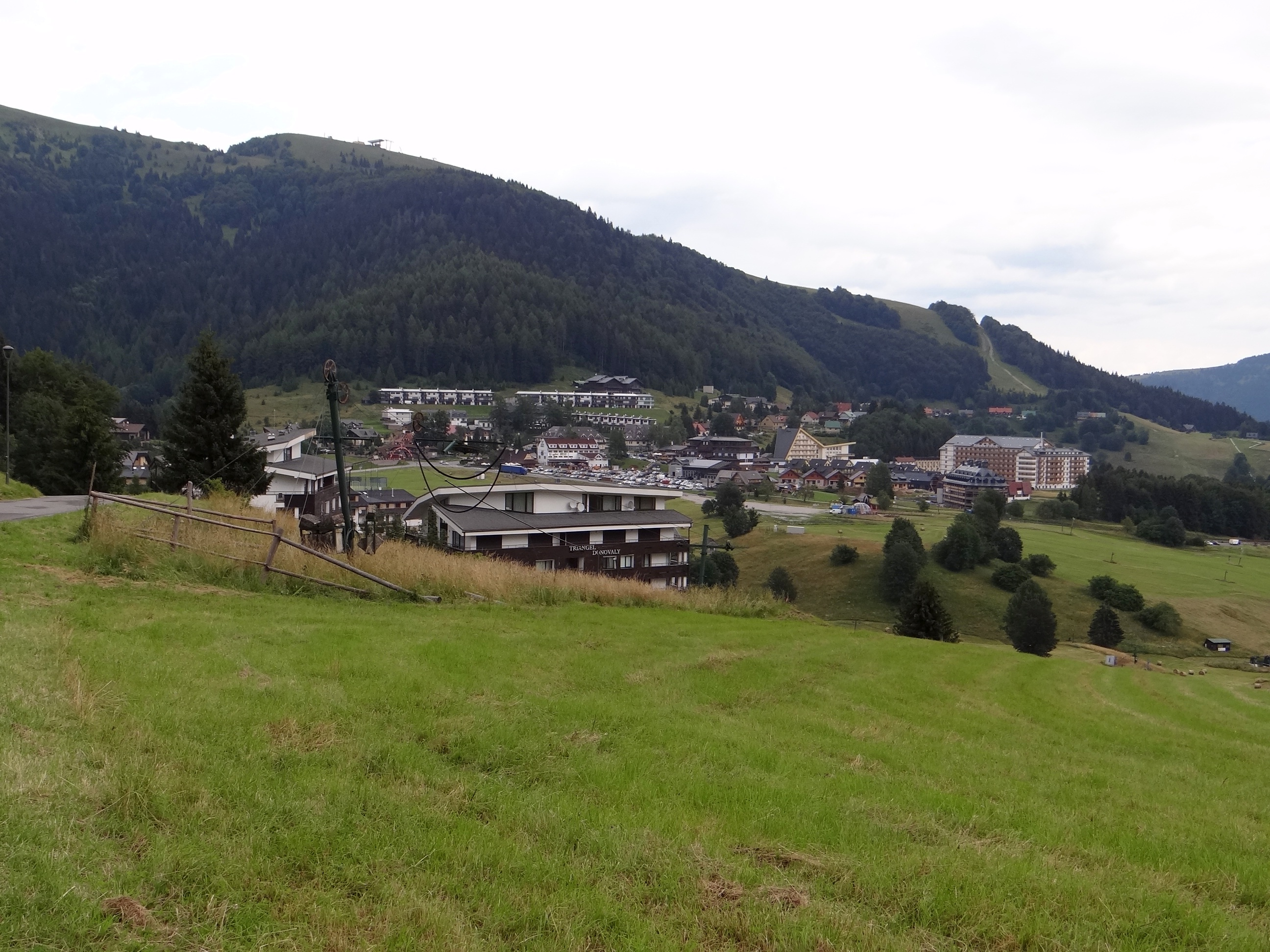 Zvolen (1403 m)